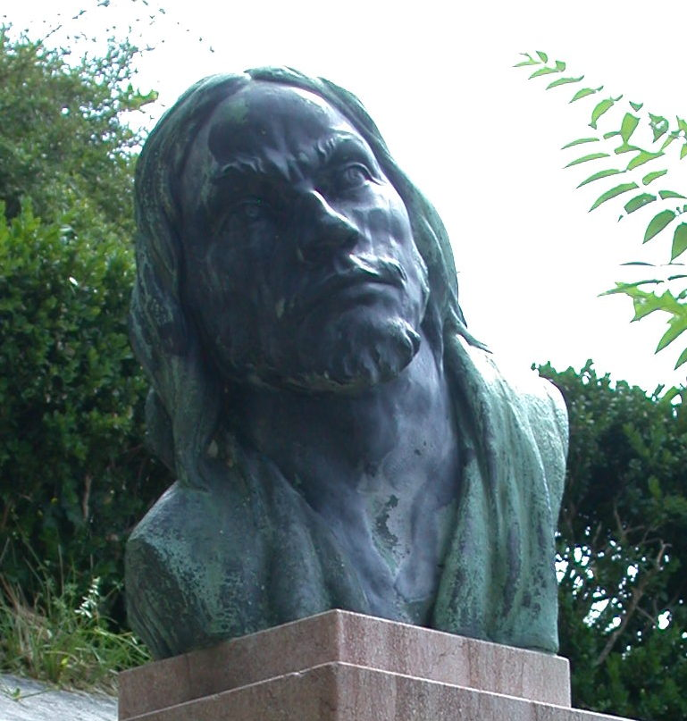 Statua del Pordenone ad Udine